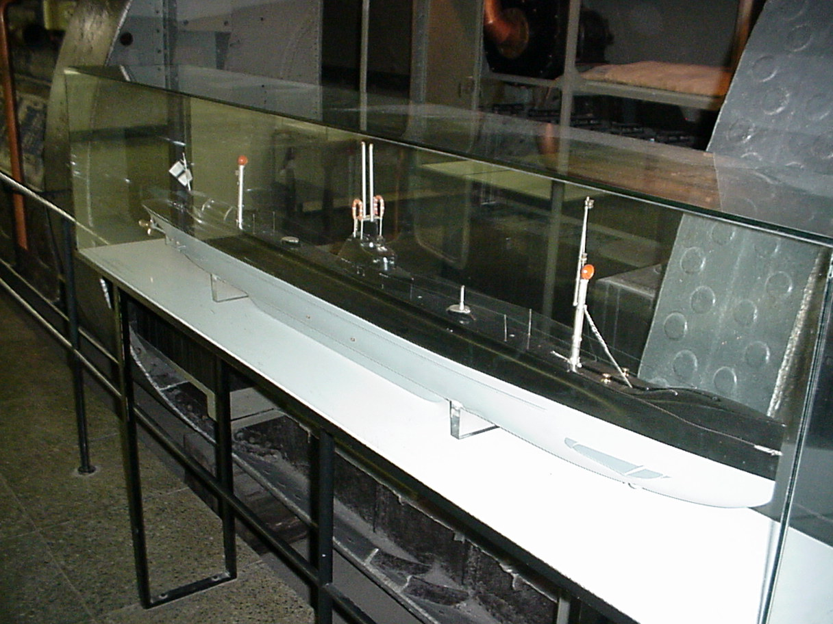 Modell von SM U 1 im April 2003 im Deutschen Museum in München.